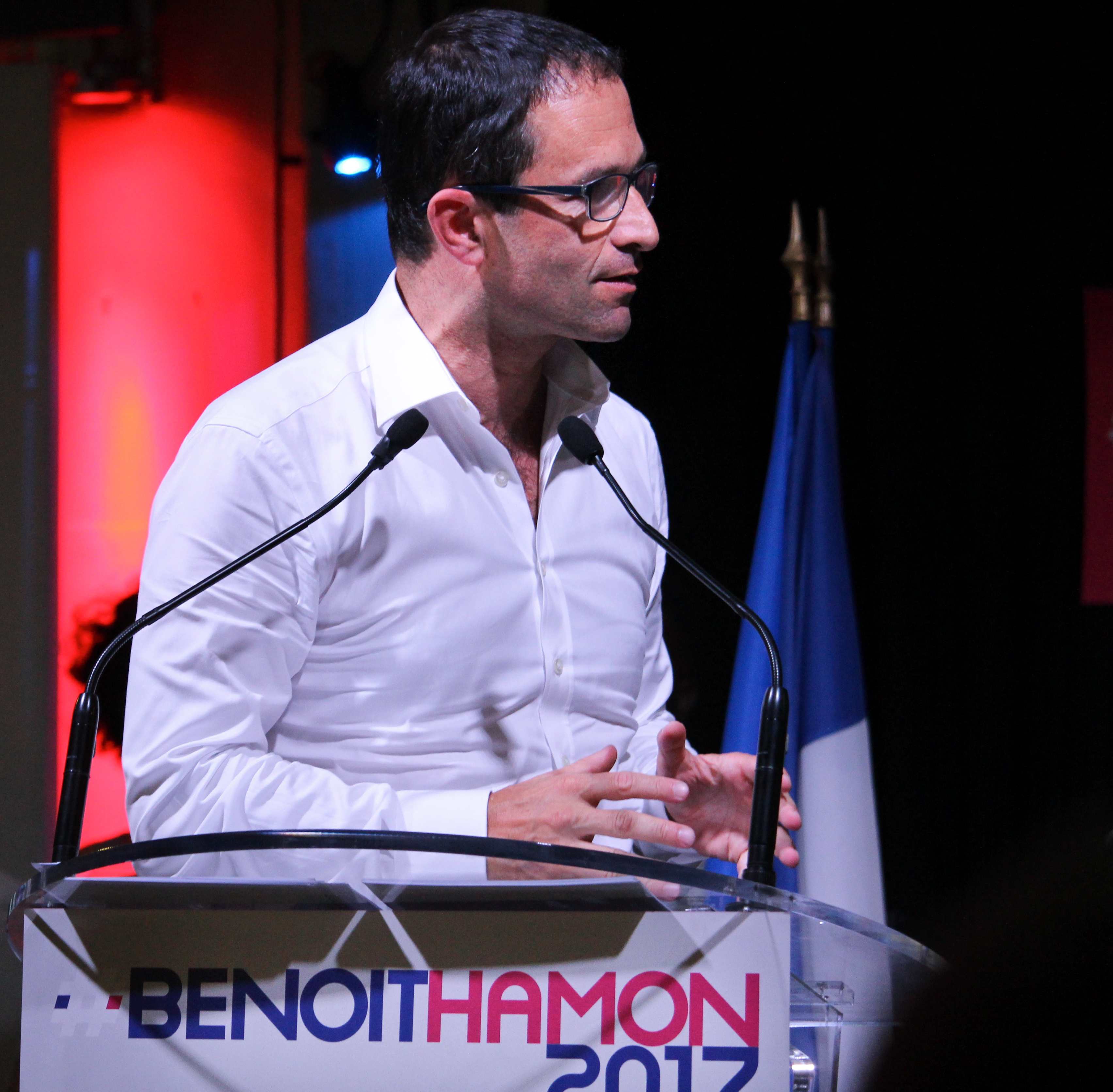 Benoît Hamon à la tribune lors de son meeting à Saint-Denis